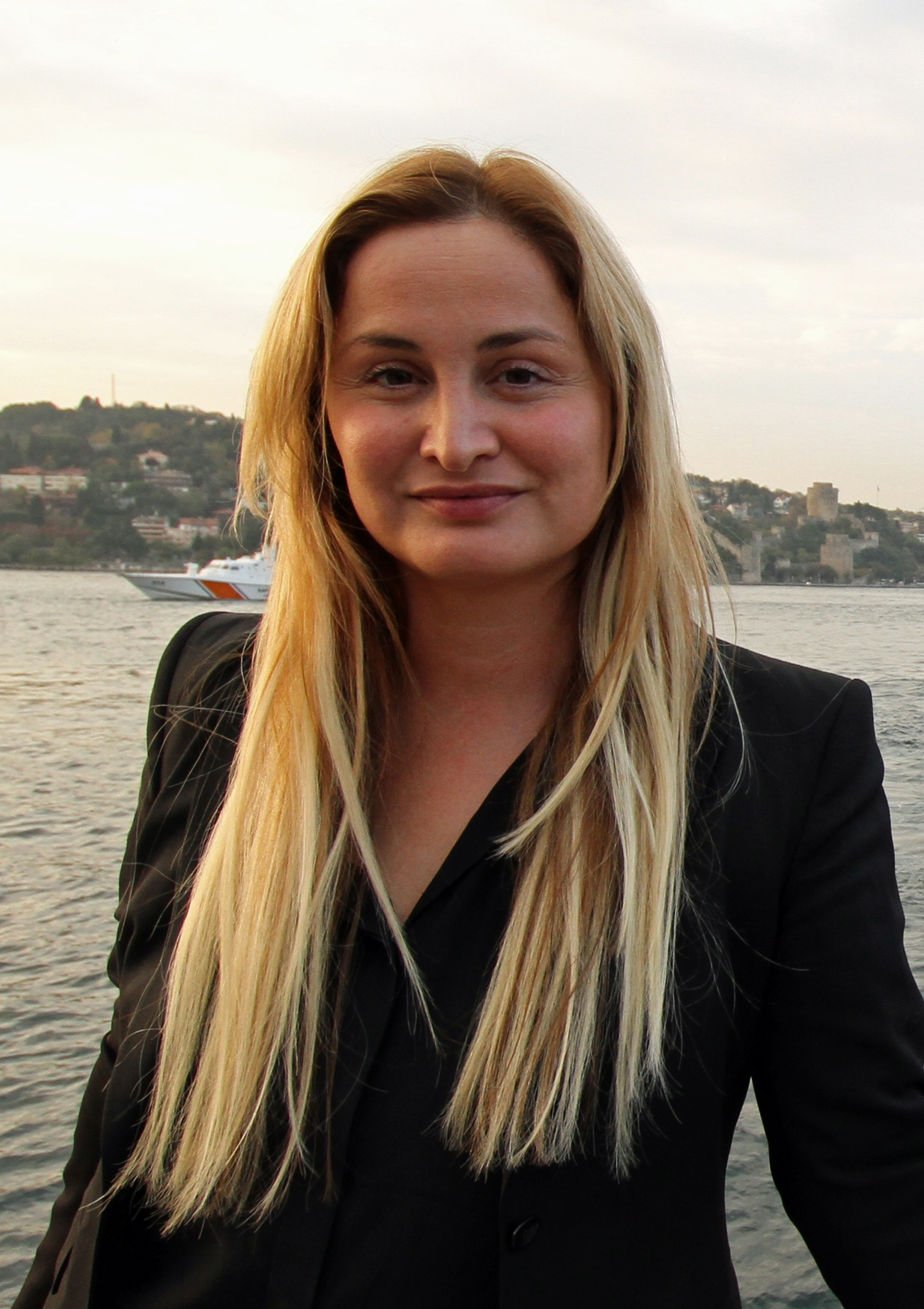 Statssekretær Dilek Ayhan ved broen over Bosporos-stredet. Istanbul, Tyrkia. Foto: Trond Viken, NHD